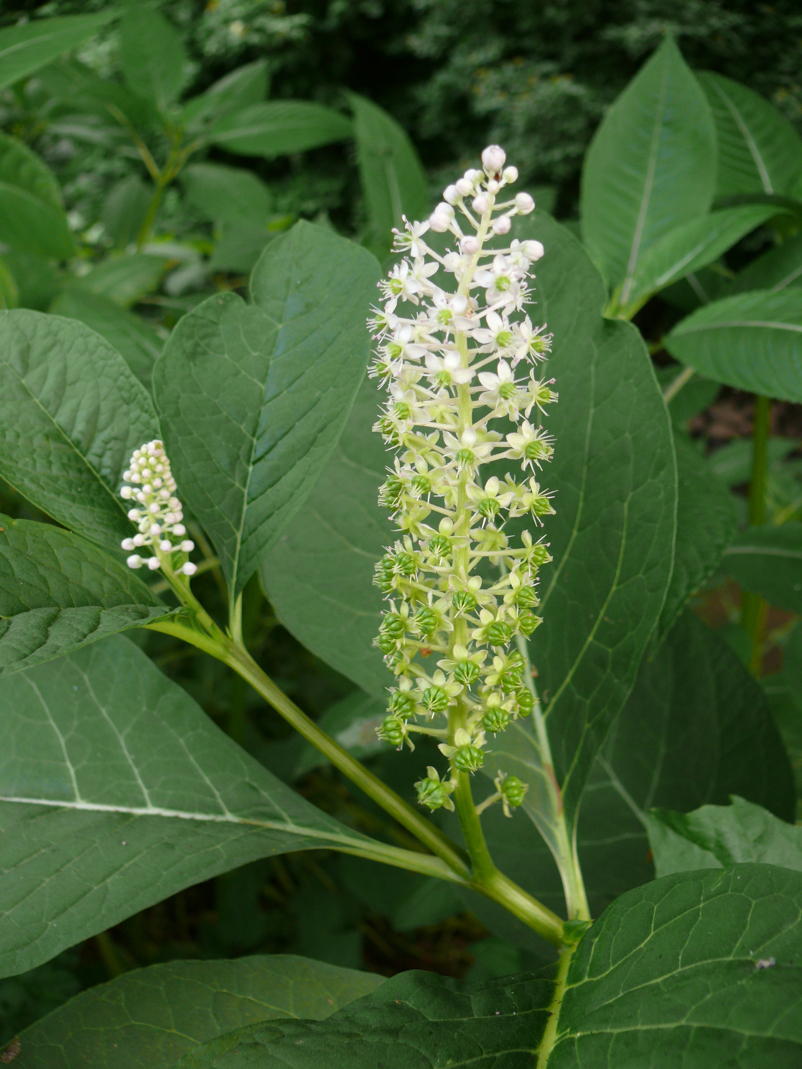 Phytolacca esculenta, Hamburg